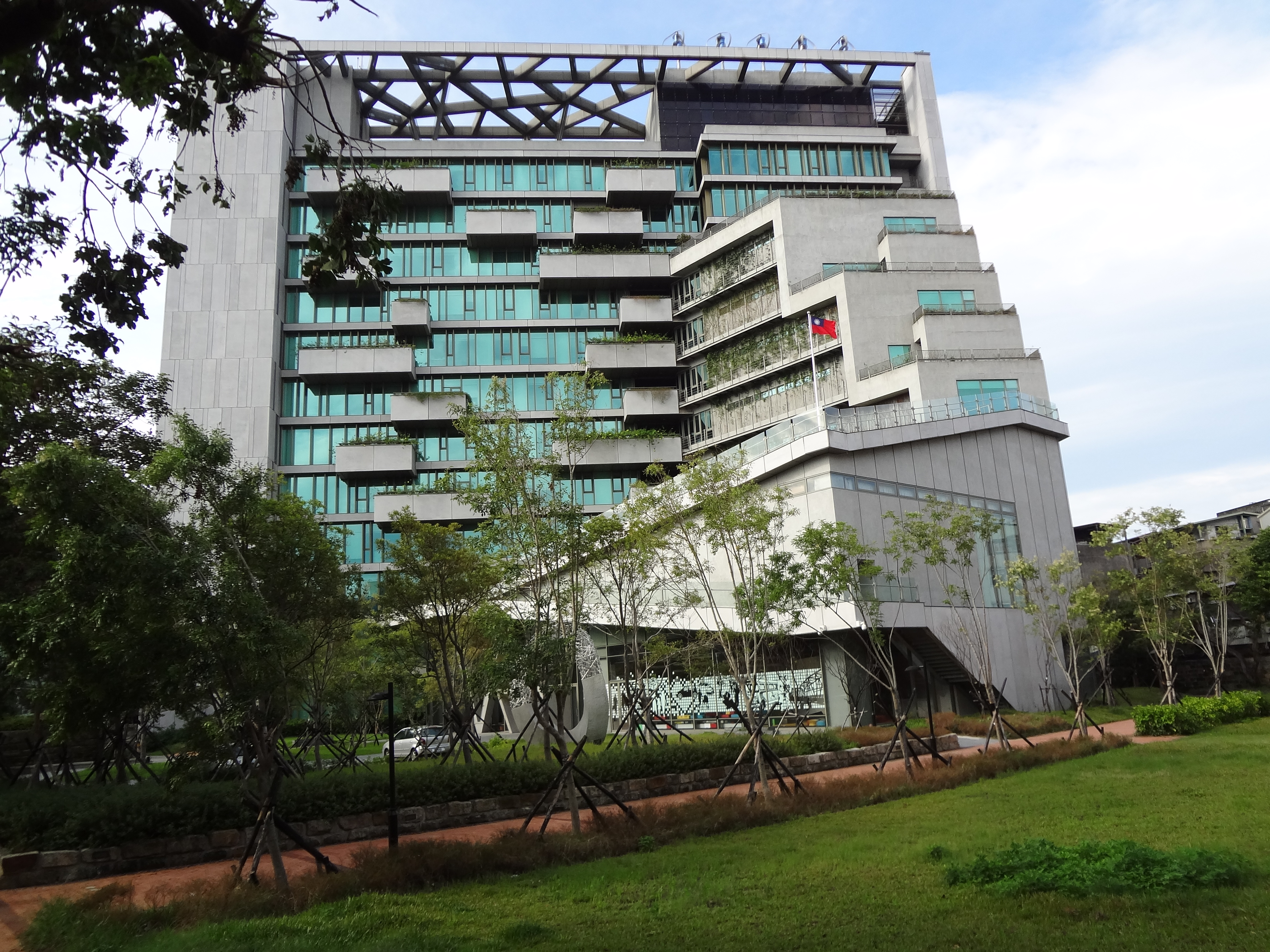 中華民國交通部公路總局大樓，位於臺北市萬華區東園街65號，2013年8月完工，2014年5月2日啟用。